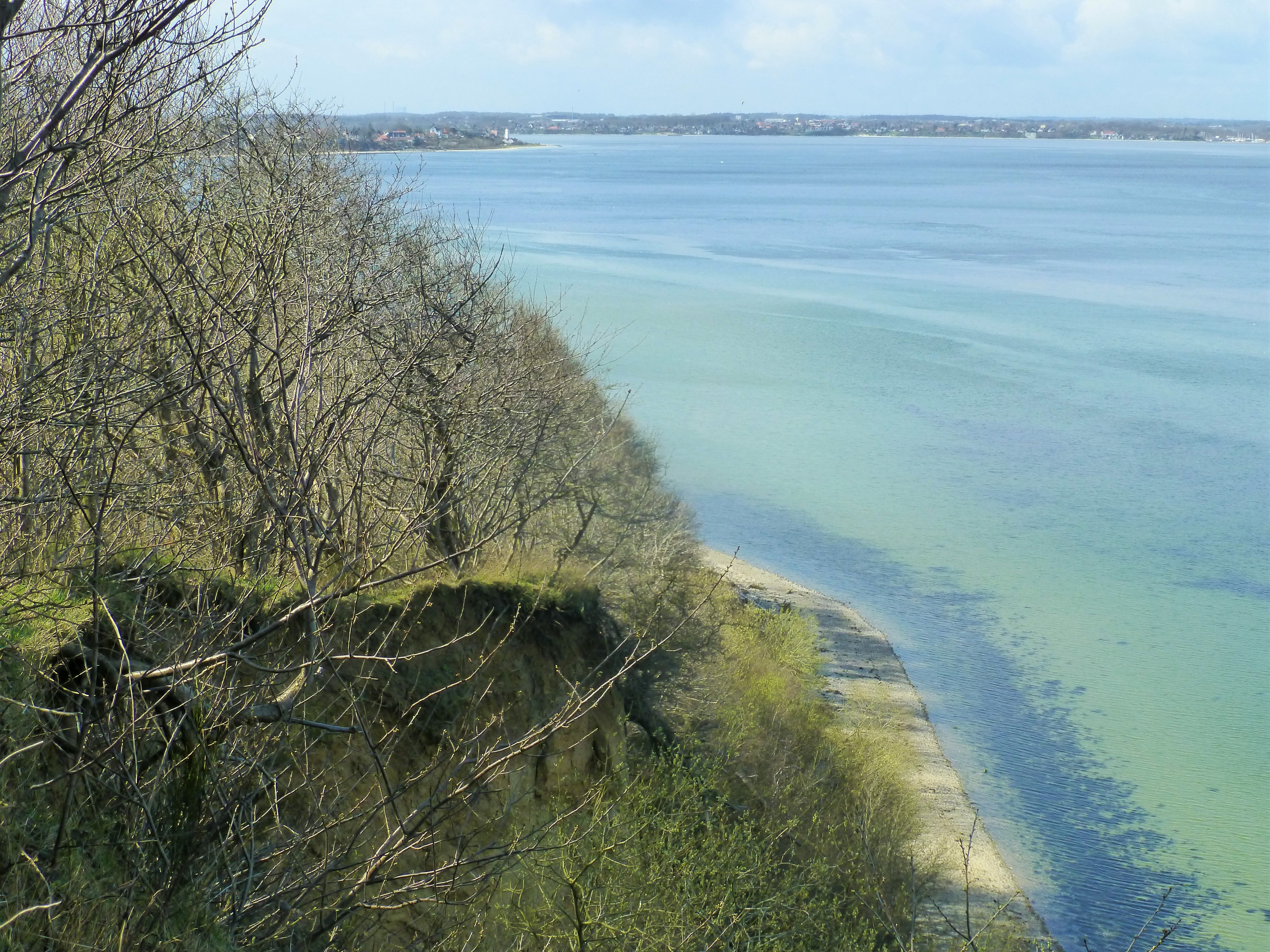 Udsigten fra Røjle Klint over Lillebælt med Strib og Middelfart i baggrunden